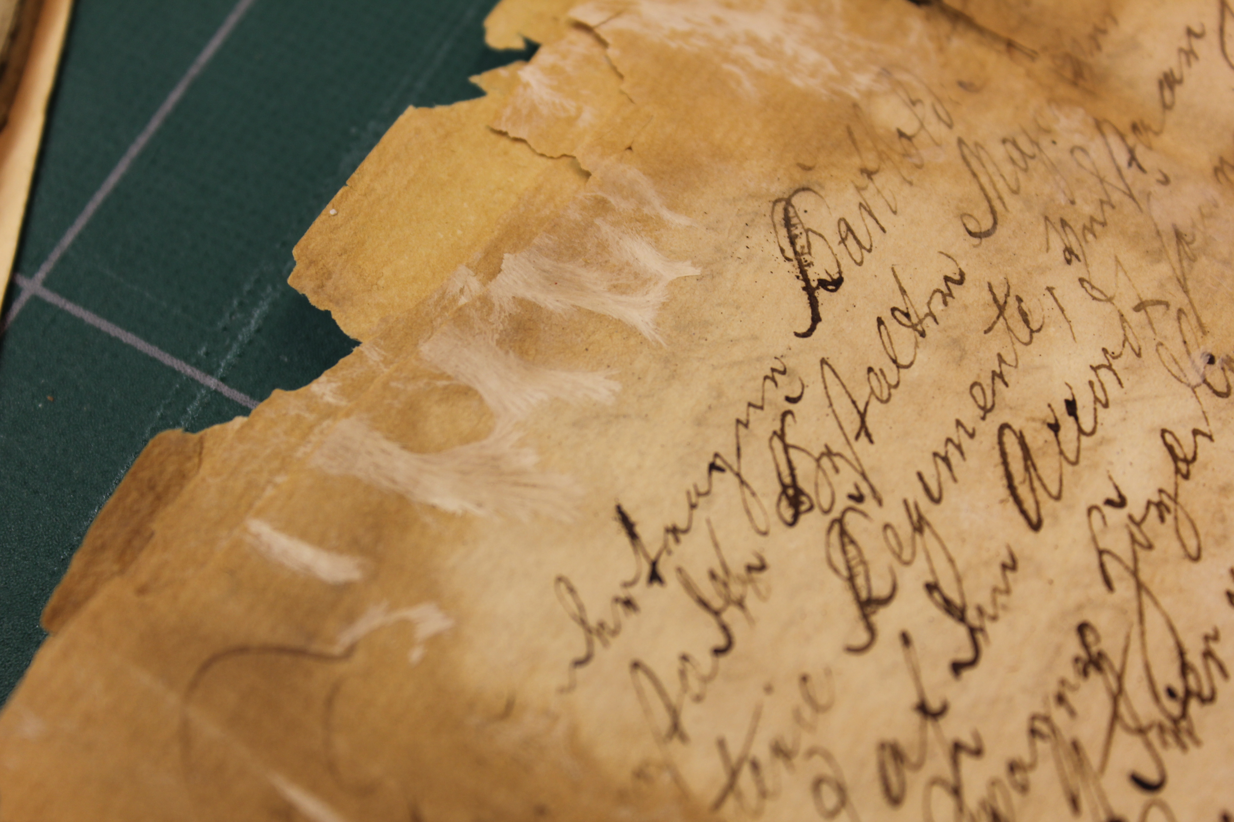 Bildet viser et dokument som er skadet og som må konserveres.